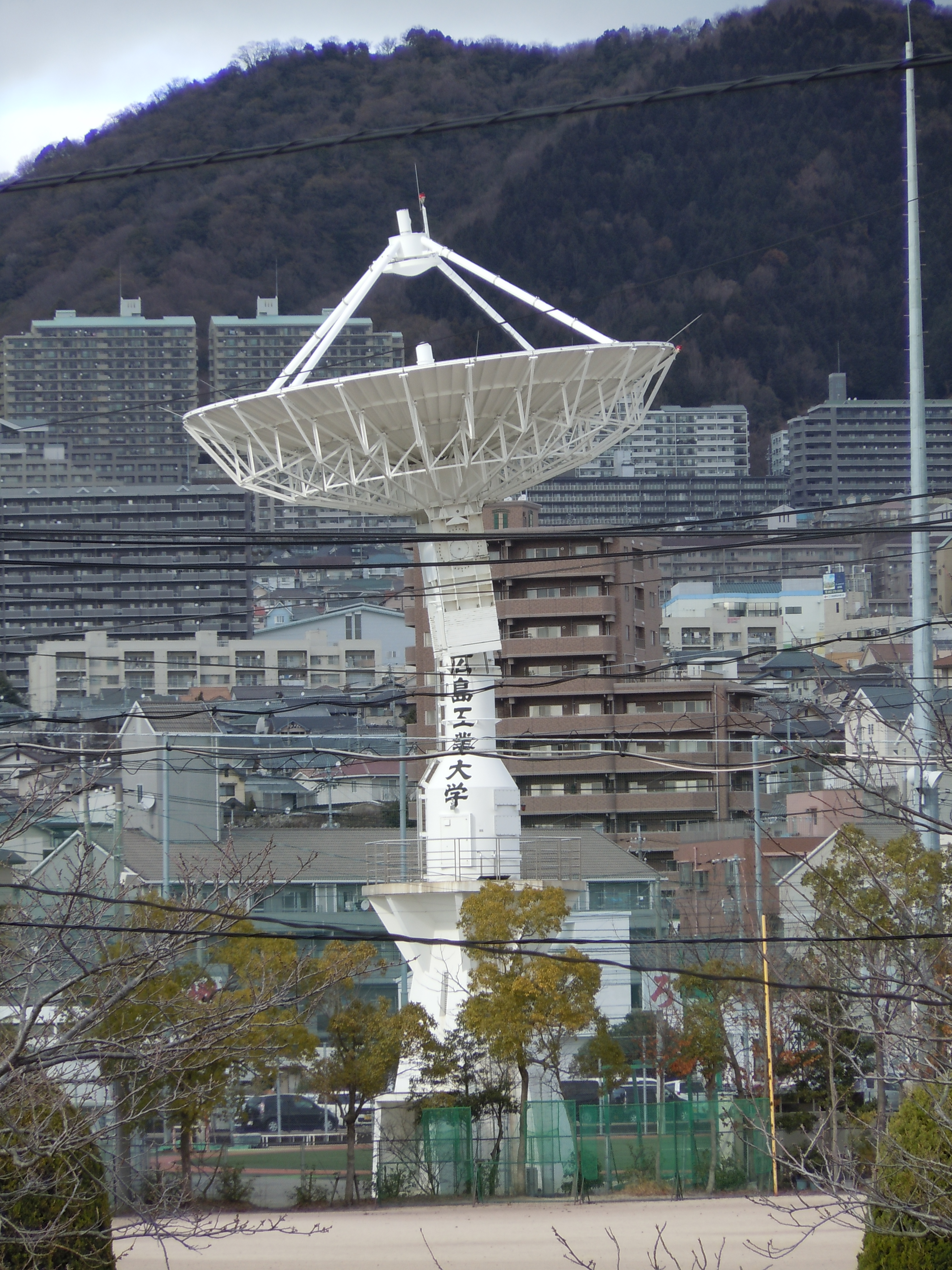 鶴学園広島工業大学高校のパラボラアンテナ